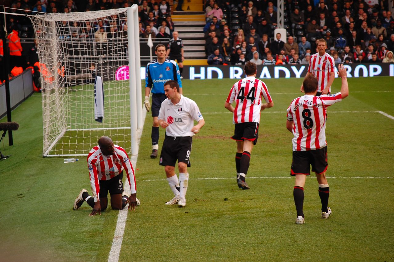 Fulham vs Sunderland at Craven Cottage on 5 April 2008.